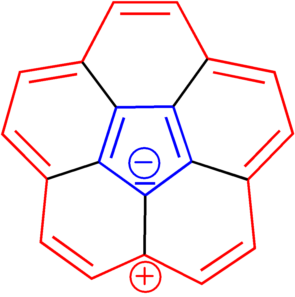 Innerer und äußerer Perimeter von Circulenen